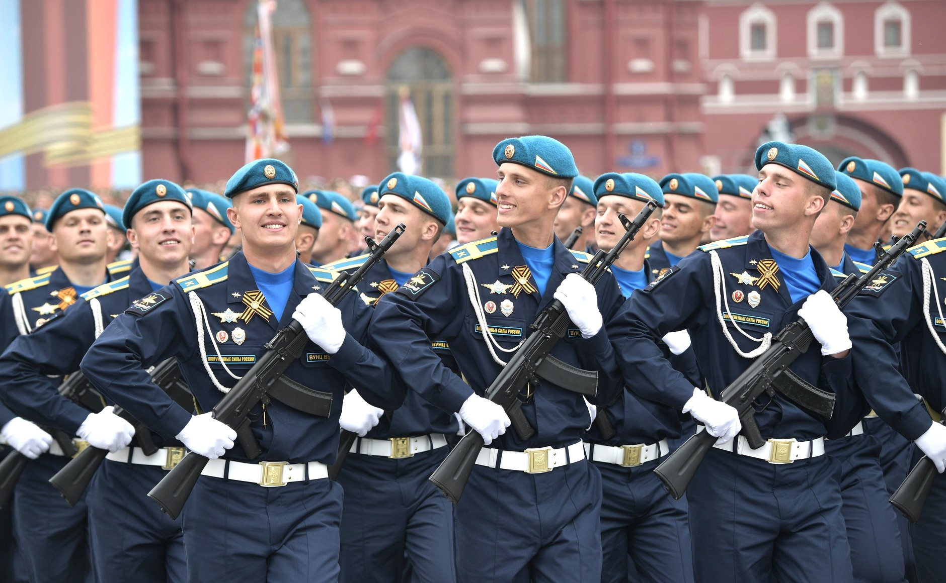 Военный парад на Красной площади в ознаменование 74-й годовщины Победы в Великой Отечественной войне 1941–1945 годов